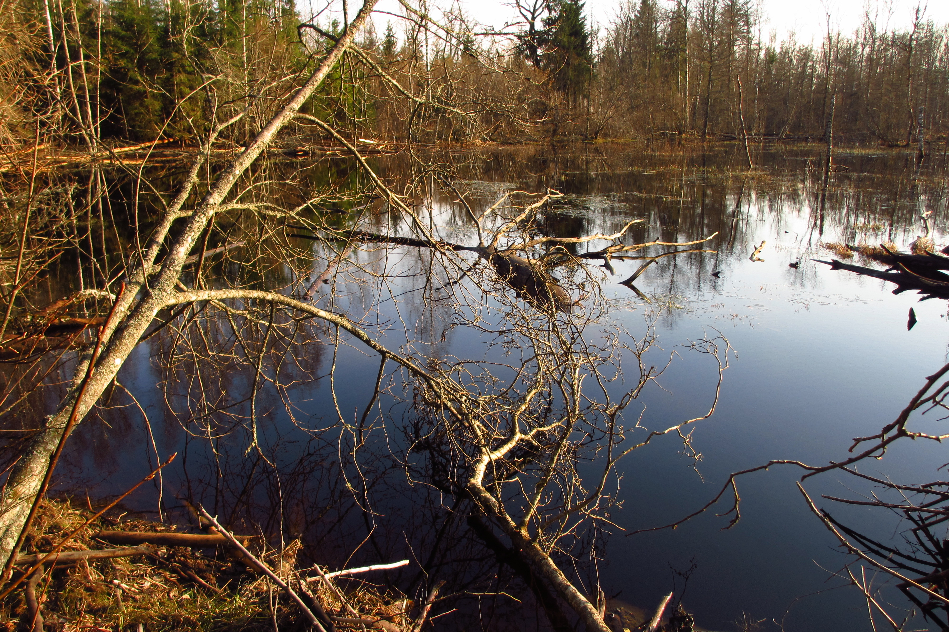 Nõmme kuristik; (Nõmme kurisu)